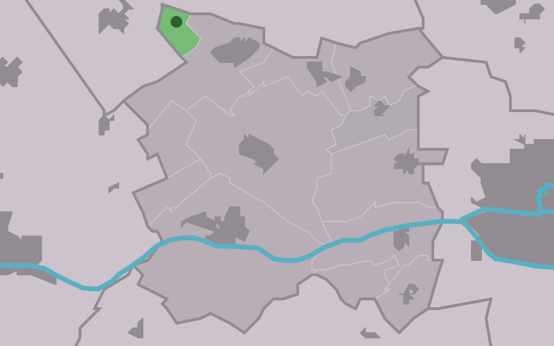 Kaartsje fan himrik fan Wier